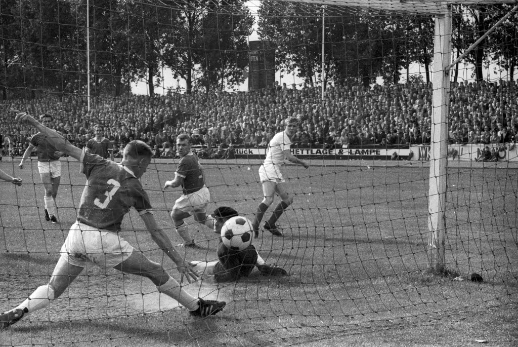 im Holsteinstadion. Im Bild Tor für Arminia Hannover. Holsteins Verteidiger Hans Wiesenmüller versucht noch vergeblich auf der Linie zu klären.